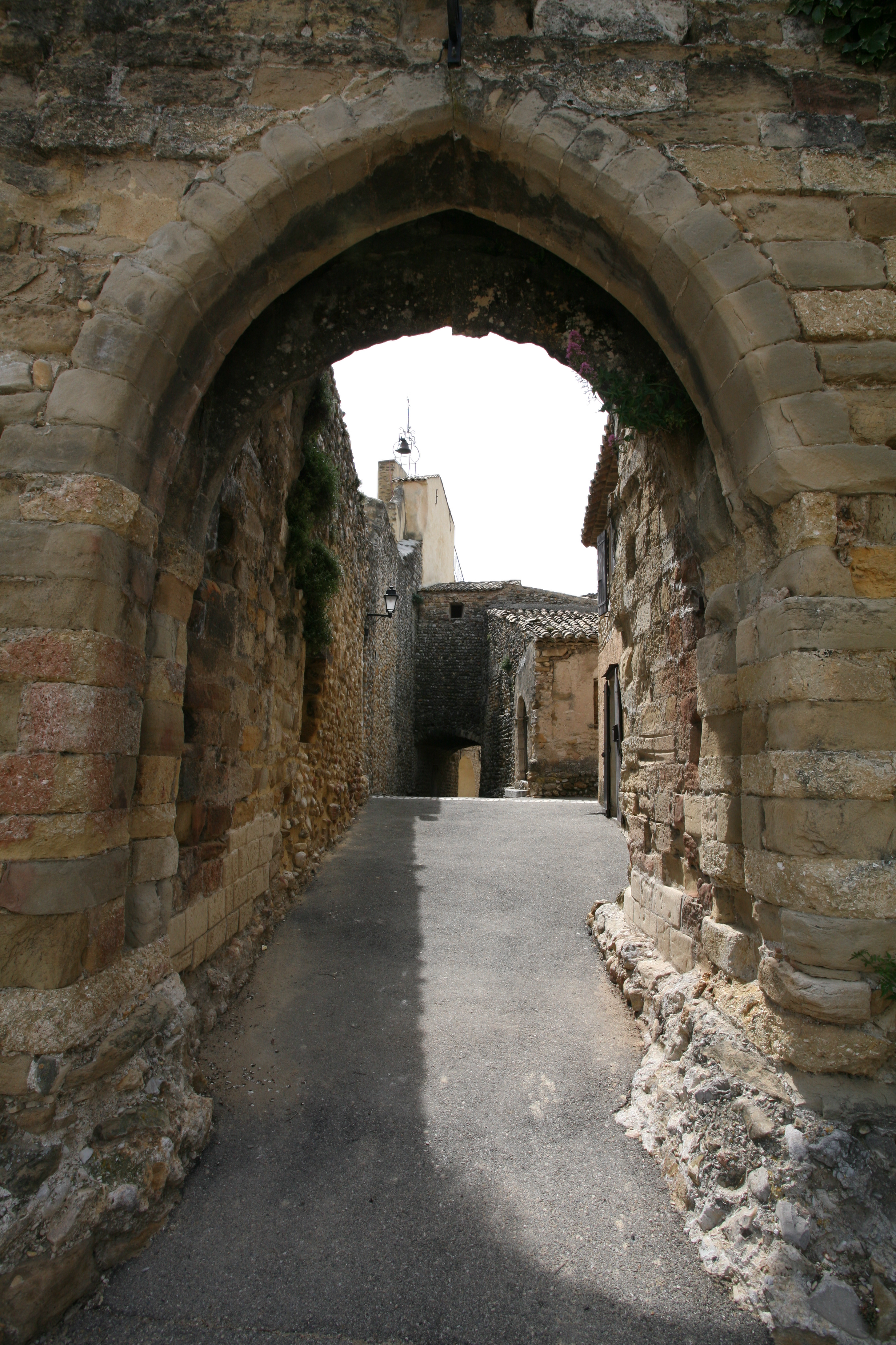 Buisson (Vaucluse)